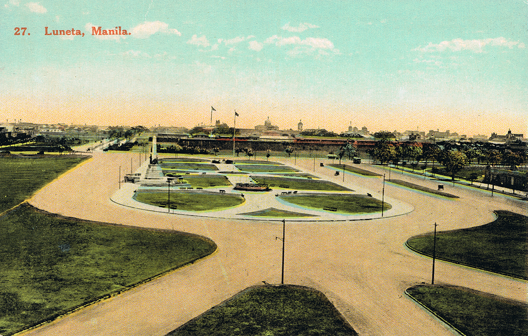 Luneta, Manila.